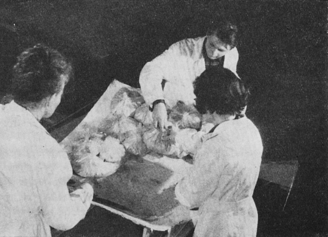 Prace konserwatorskie przy malowidłach z Faras w Muzeum Narodowym w Warszawie. Układanie fragmentów najwcześniejszego przedstawienie z niszy na łóżeczku gipsowym i obciążanie ich woreczkami z piaskiem